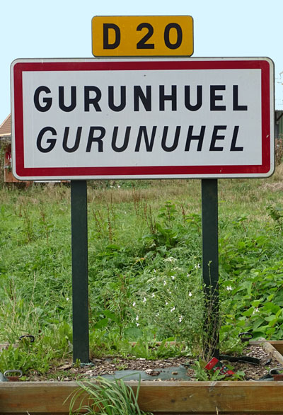 Gurunuhel. Panell hent